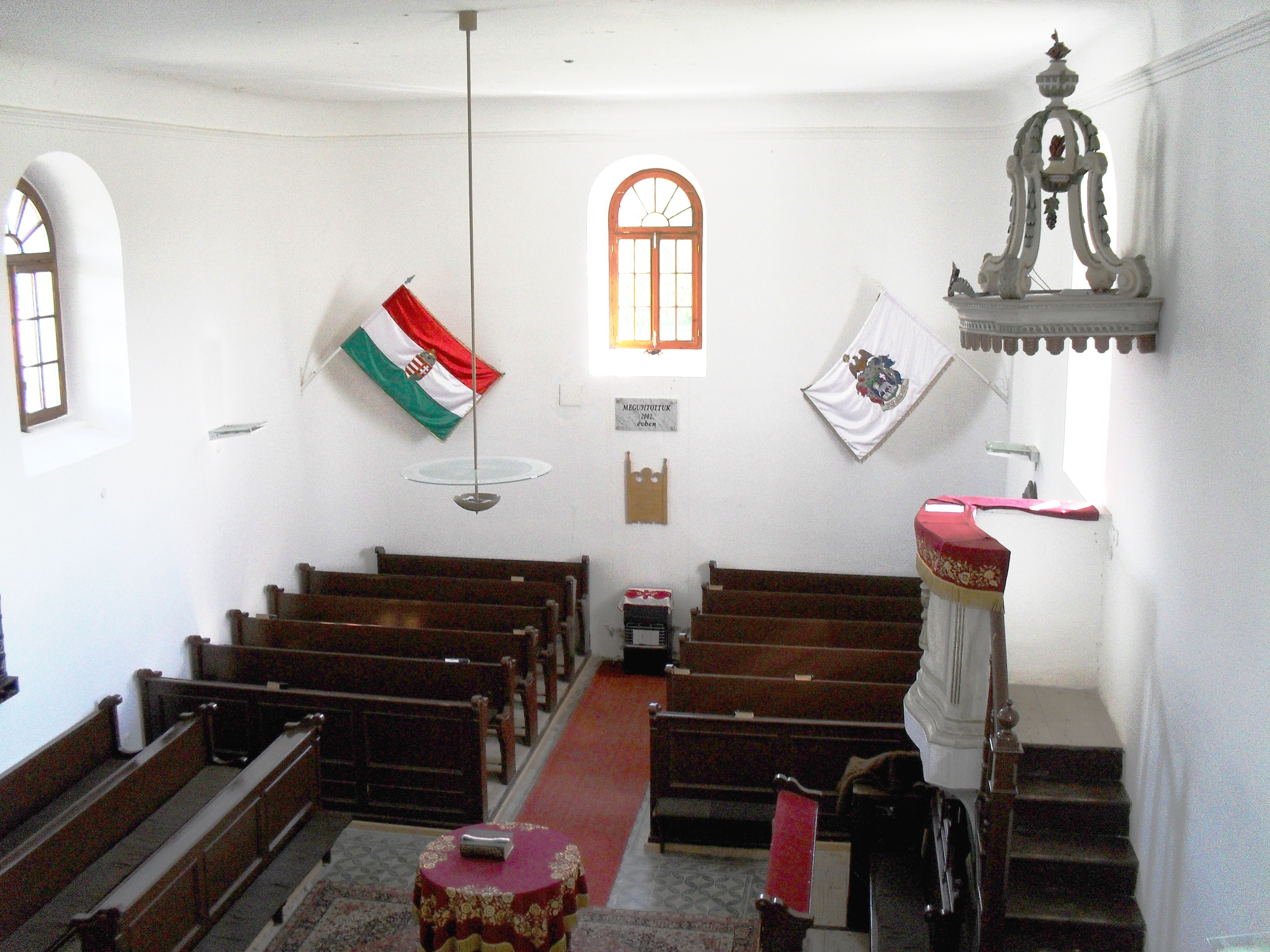 Dunabogdány - református templom belseje